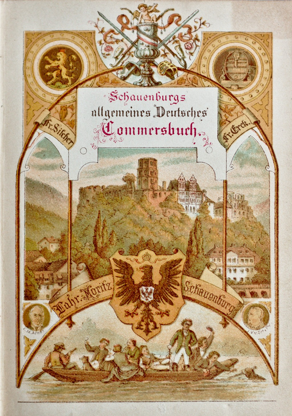 In mehreren Auflagen (ca. 30. bis 42.) des Allgemeinen Deutschen Commersbuches verwendete der Verlag Moritz Schauenburg ein alternatives Titelbild mit einer Stadtansicht von Heidelberg.